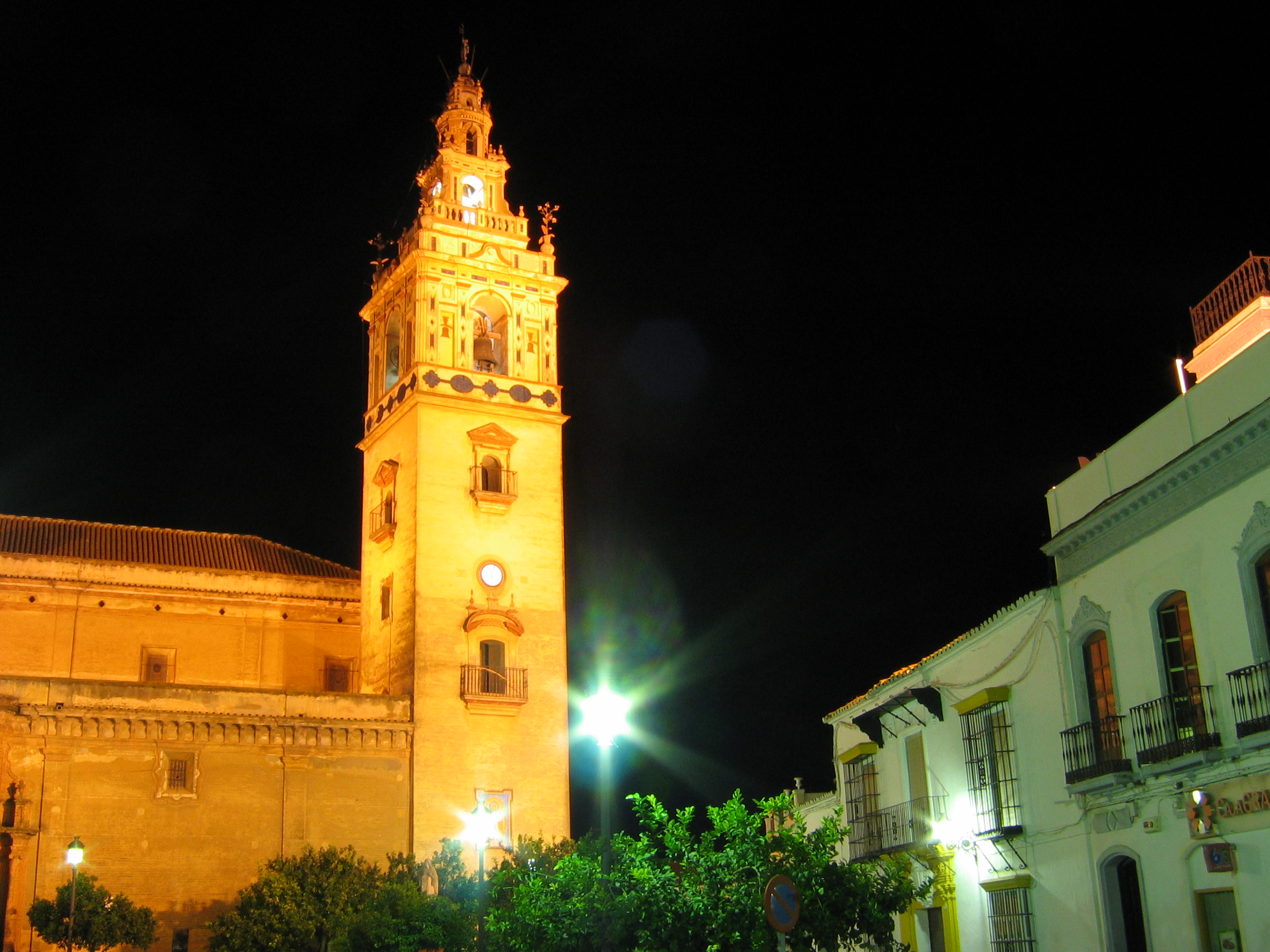 Iglesa Parroquial Nuestra Señora de la Granada, en Moguer (Huelva, España). Es el templo mayor de la provincia de Huelva. Es un magnífico templo levantado en el siglo XVIII sobre las ruinas de la antigua parroquia mudéjar del siglo XIV que fue derribada por el terremoto de Lisboa de 1755.